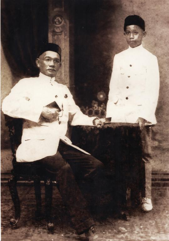 Saiyed Husin bin Ghulam Al Bukhari bersama cucunya Syed Abdul Rahman bin Syed Salim bin Saiyed Husin al-Bukhari pada tahun 1902.